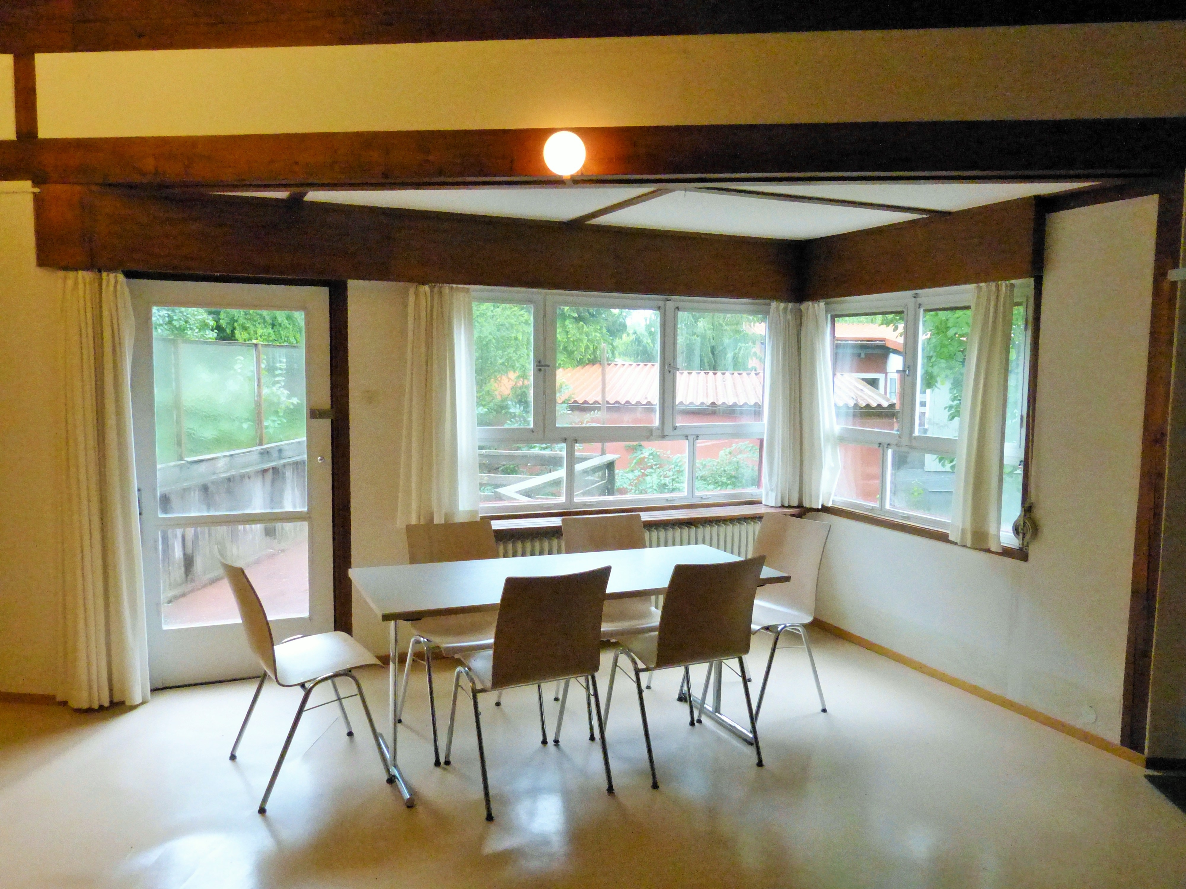 Hugo-Häring-Haus; 2019